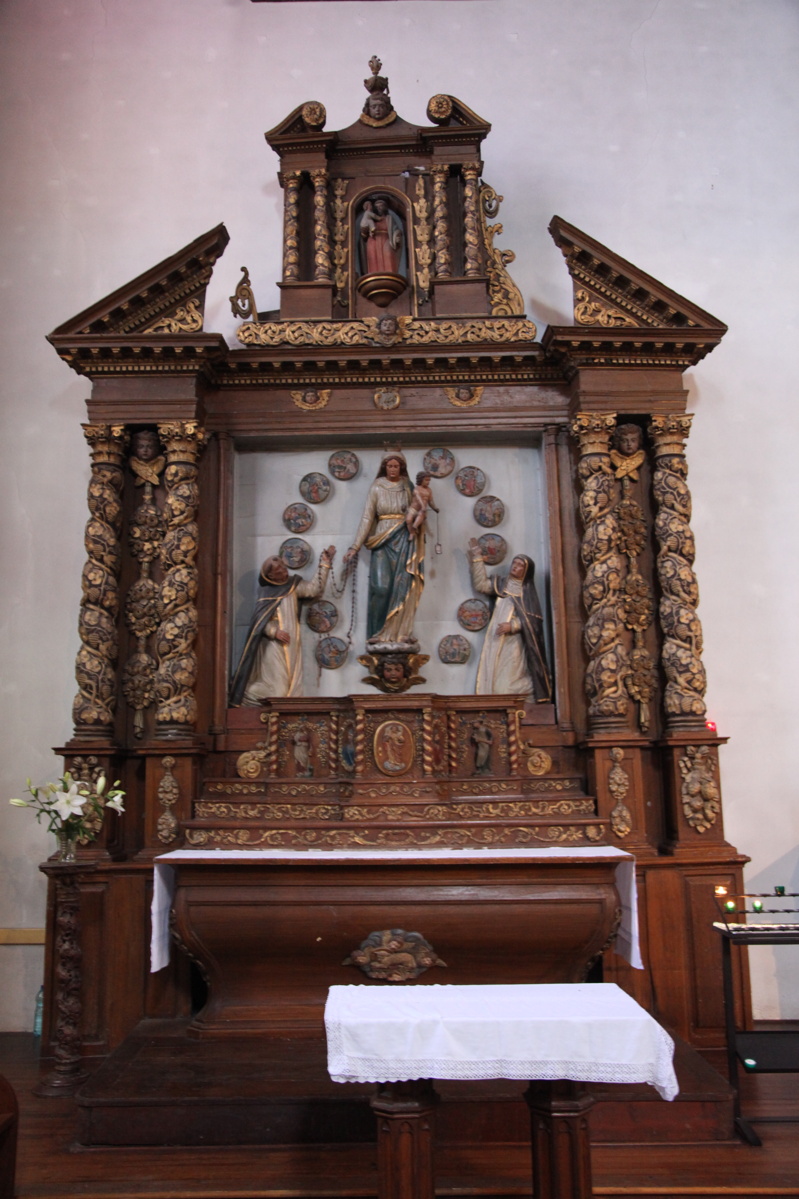 Église Saint-Pierre de Crozon. Retable du Rosaire